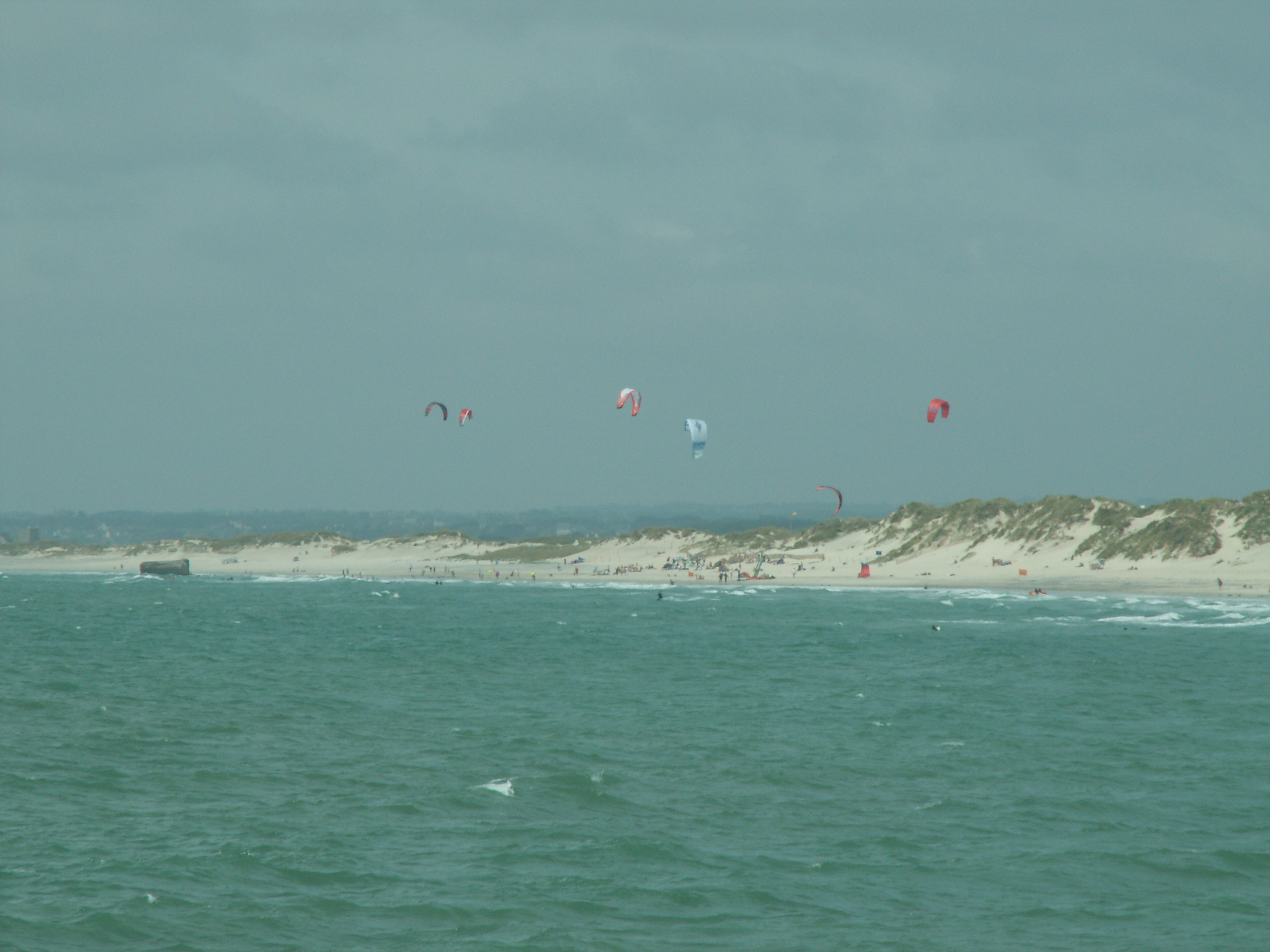 Plage de la torche Finistère France